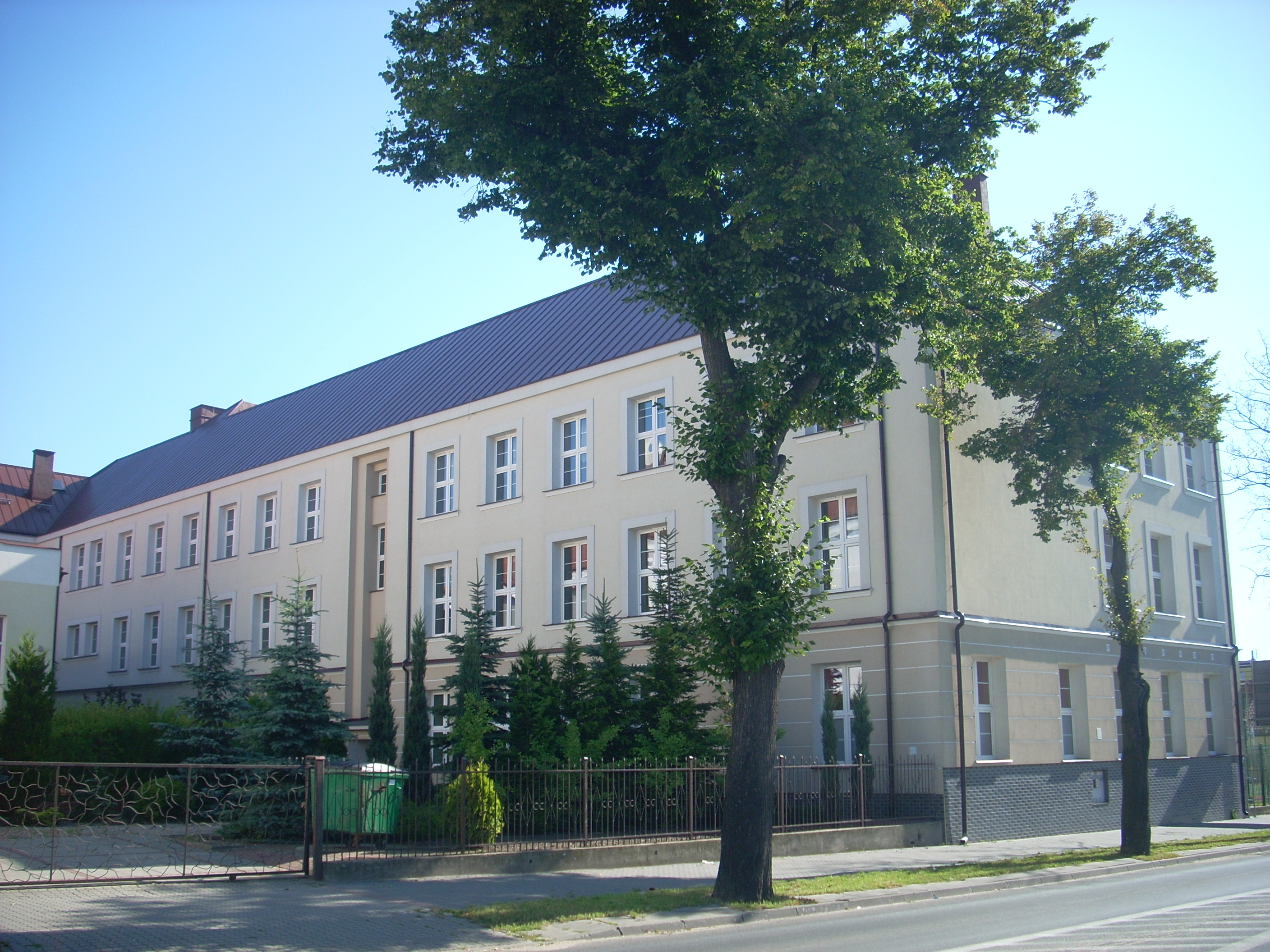 Szkoła Podstawowa nr 2 im. Henryka Sienkiewicza w Przasnyszu; bydynek zbudowany w okresie międzywojennym